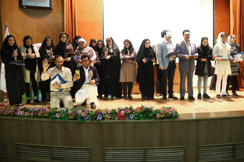 آموزگاران برگزیده‌ی با من بخوان در همایش سال 1395